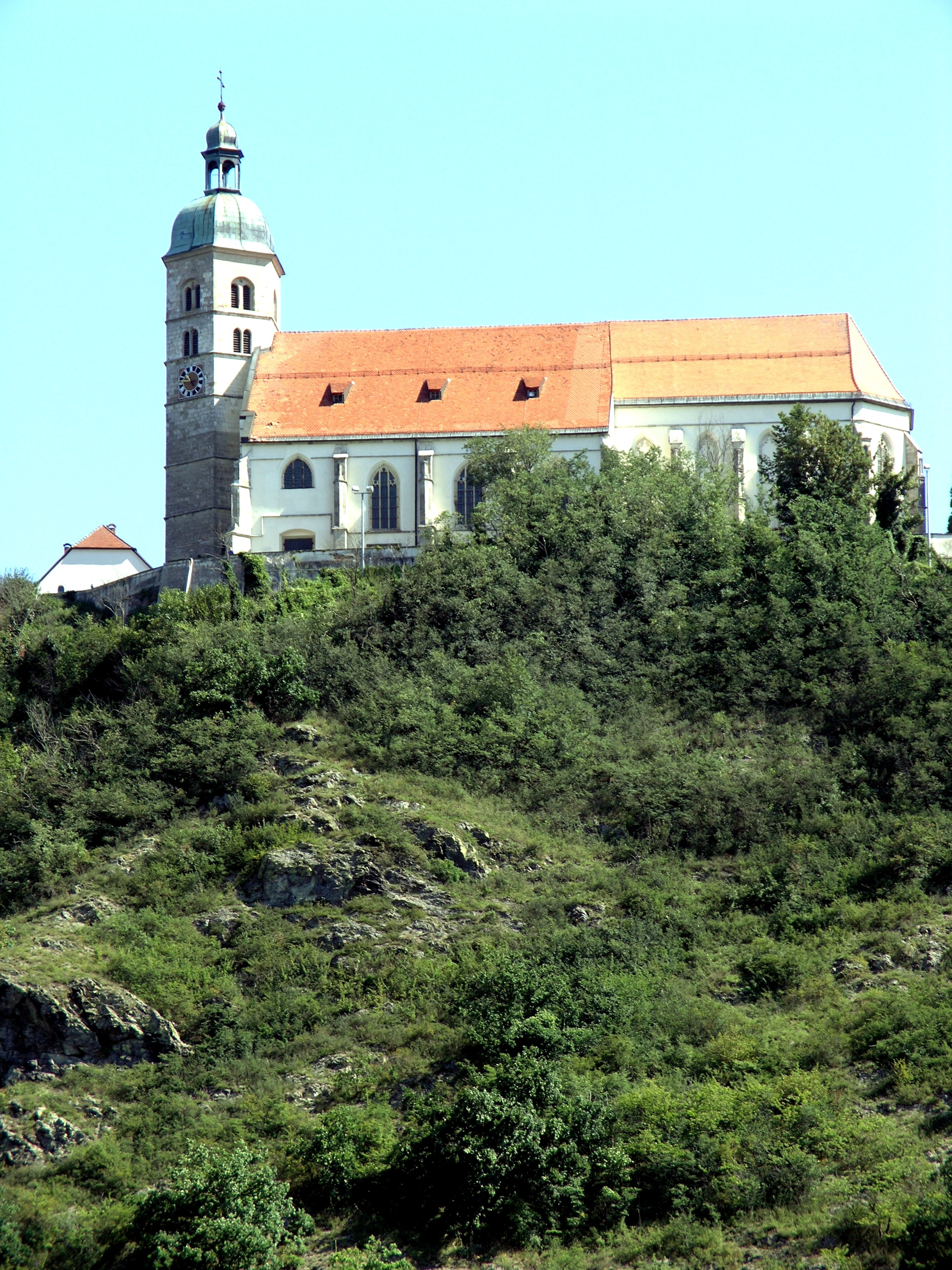 Wallfahrtskirche „Mariä Himmelfahrt“ auf dem Bogenberg, Steinhang im Vordergrund im Naturschutzgebiet Bogenberg